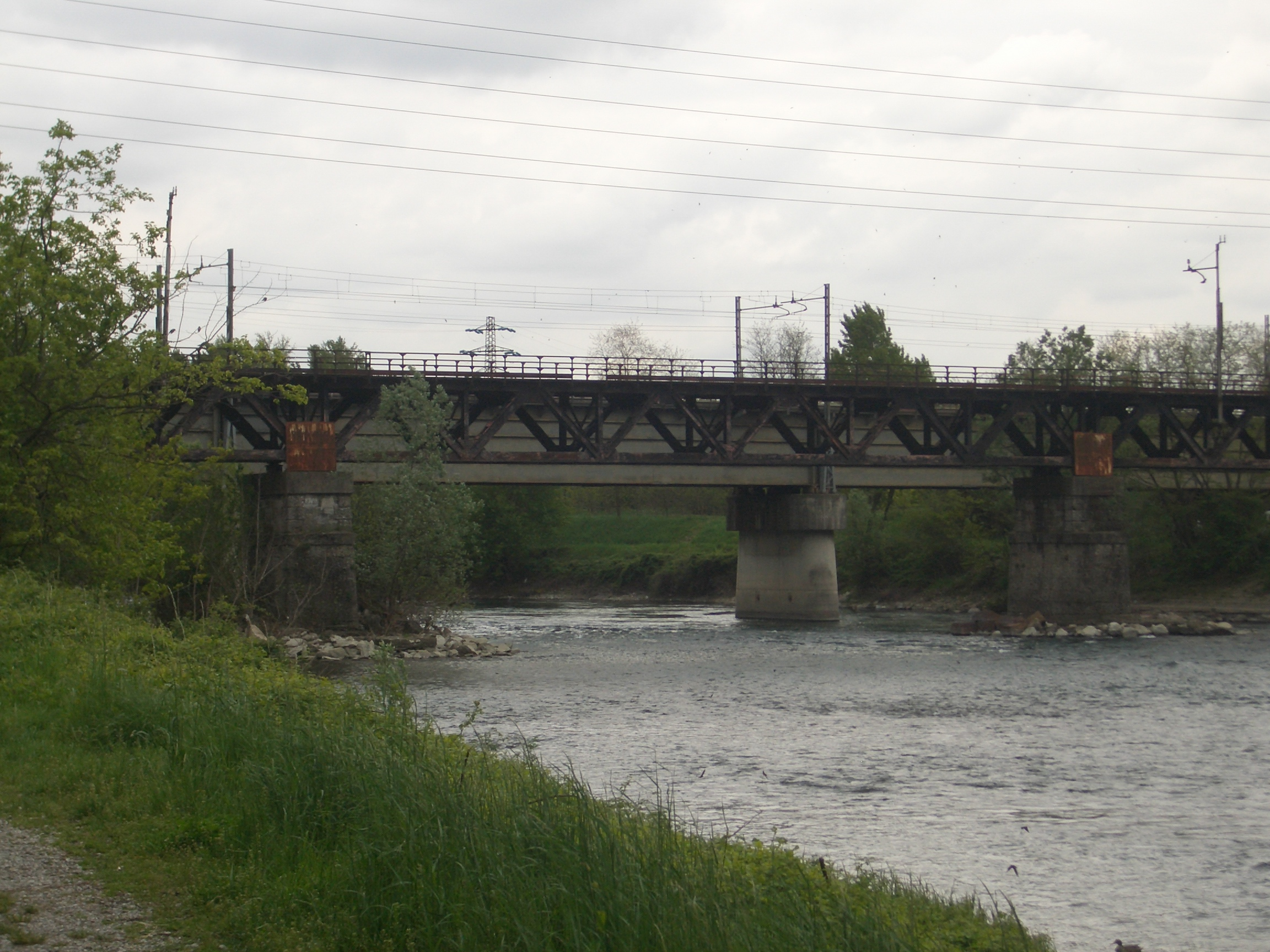 Vecchio ponte ferroviario sull'Adda, nel comune di Olginate. Chiuso ai treni, verrà prossimamente aperte come ponte per la pista ciclabile dei laghi.